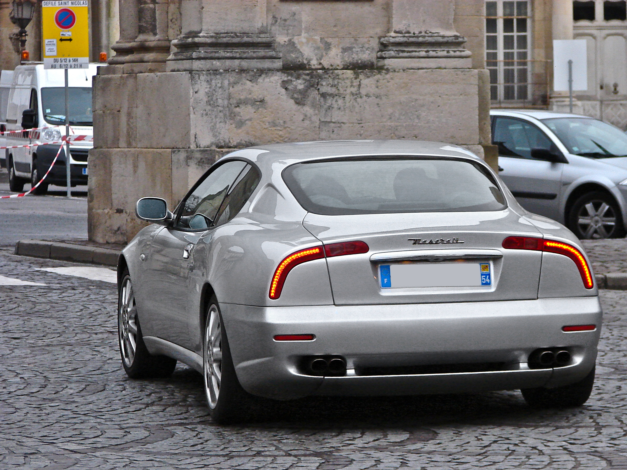 Maserati 3200 GT